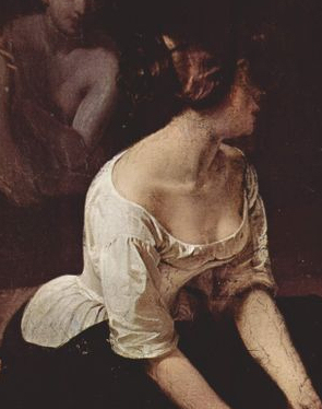 detail